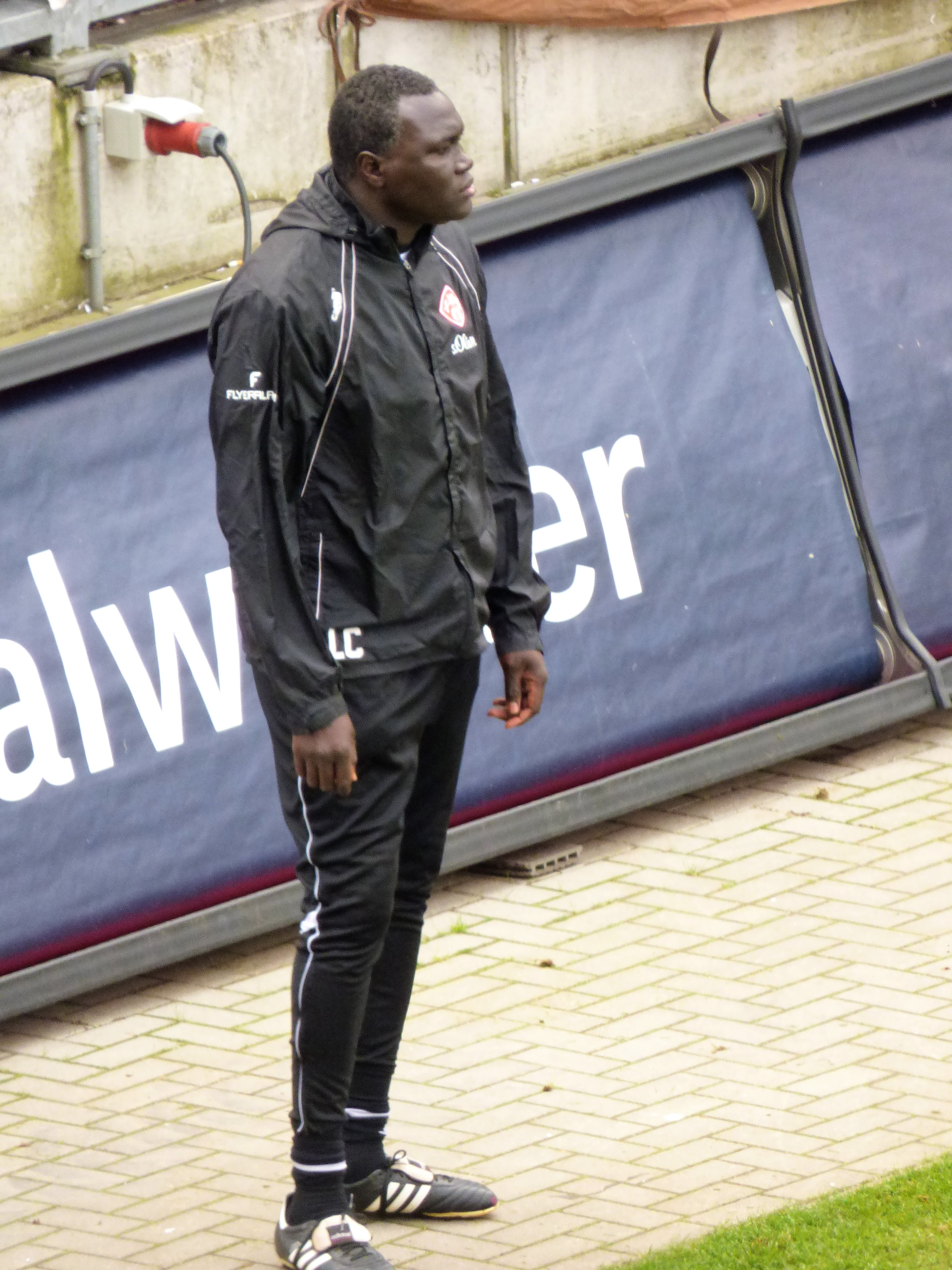 Lamine Cisse Co-Trainer Würzbürger Kickers